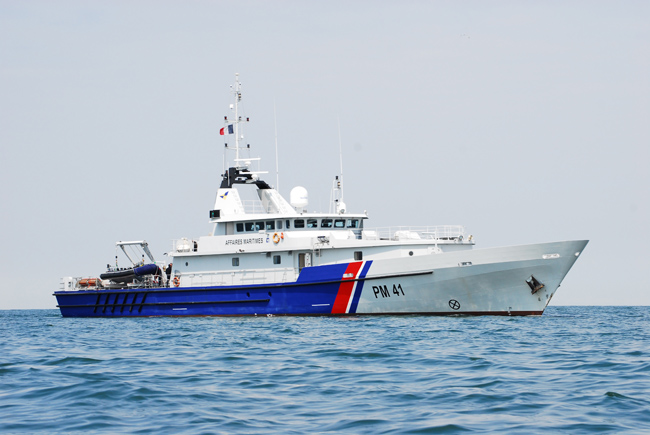 Pam Themis